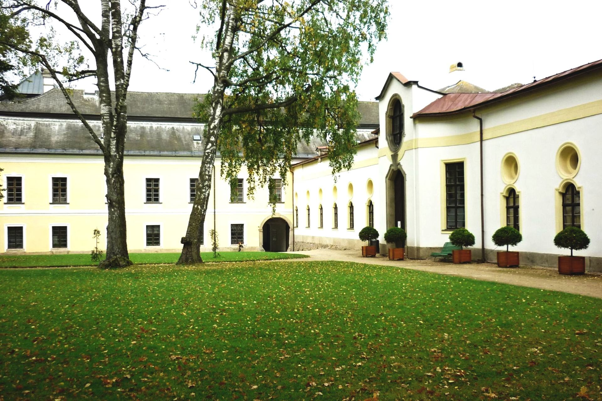 Zámek ve Žďáru nad Sázavou